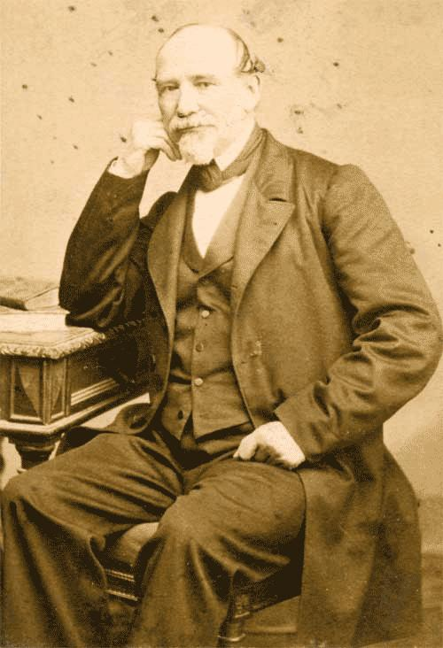 Photographie de Agricol Perdiguier (1805-75) vers la fin de sa vie